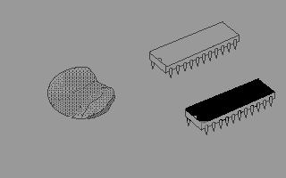 Chips - Eine C64 Hires-Grafik die ich damals mit GEOS 64 (GeoPaint) pixelte (Version ohne den Border)